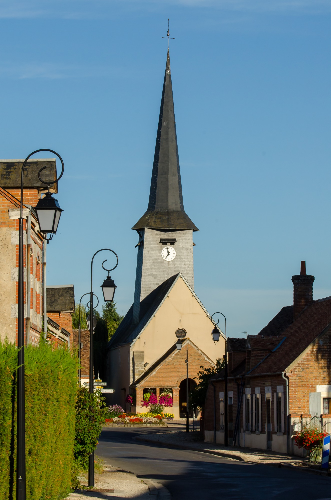 Eglise de Villemurlin